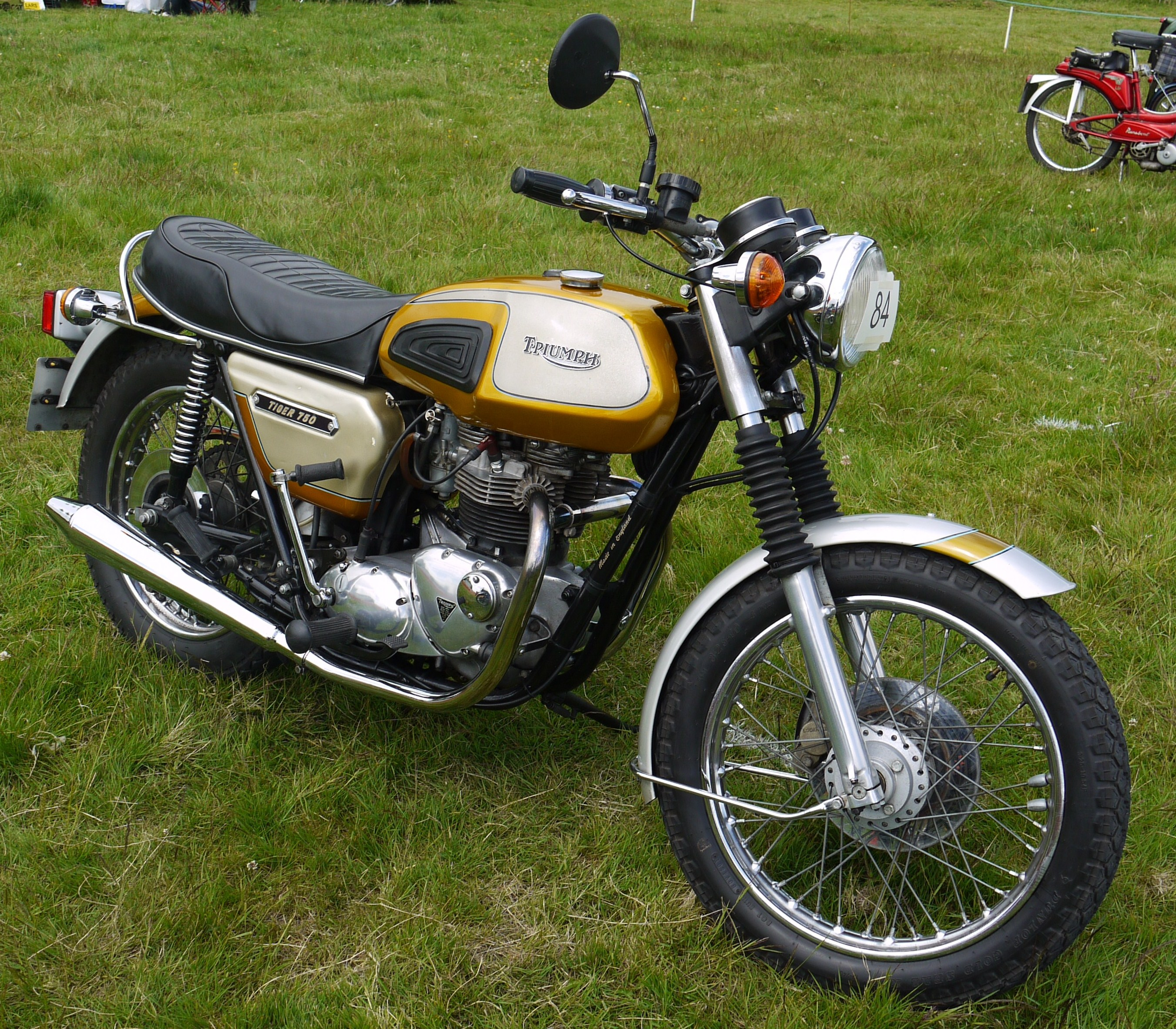 Panasonic G1 14-45 Lens